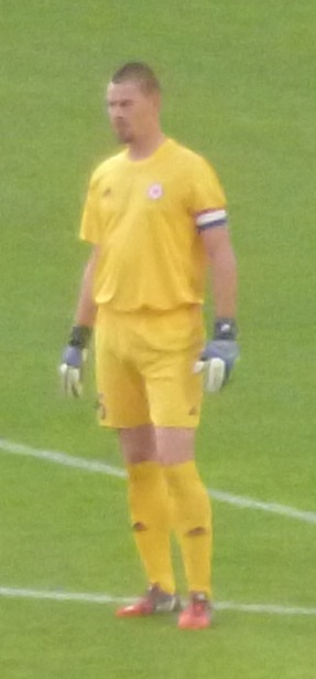 Le gardien de but de football Vincent Planté, sous le maillot du Red Star Football Club, lors d'un match du championnat de Ligue 2, le 14 août 2015, entre le Red Star Football Club et Tours Football Club, au stade Pierre-Brisson de Beauvais (Oise).